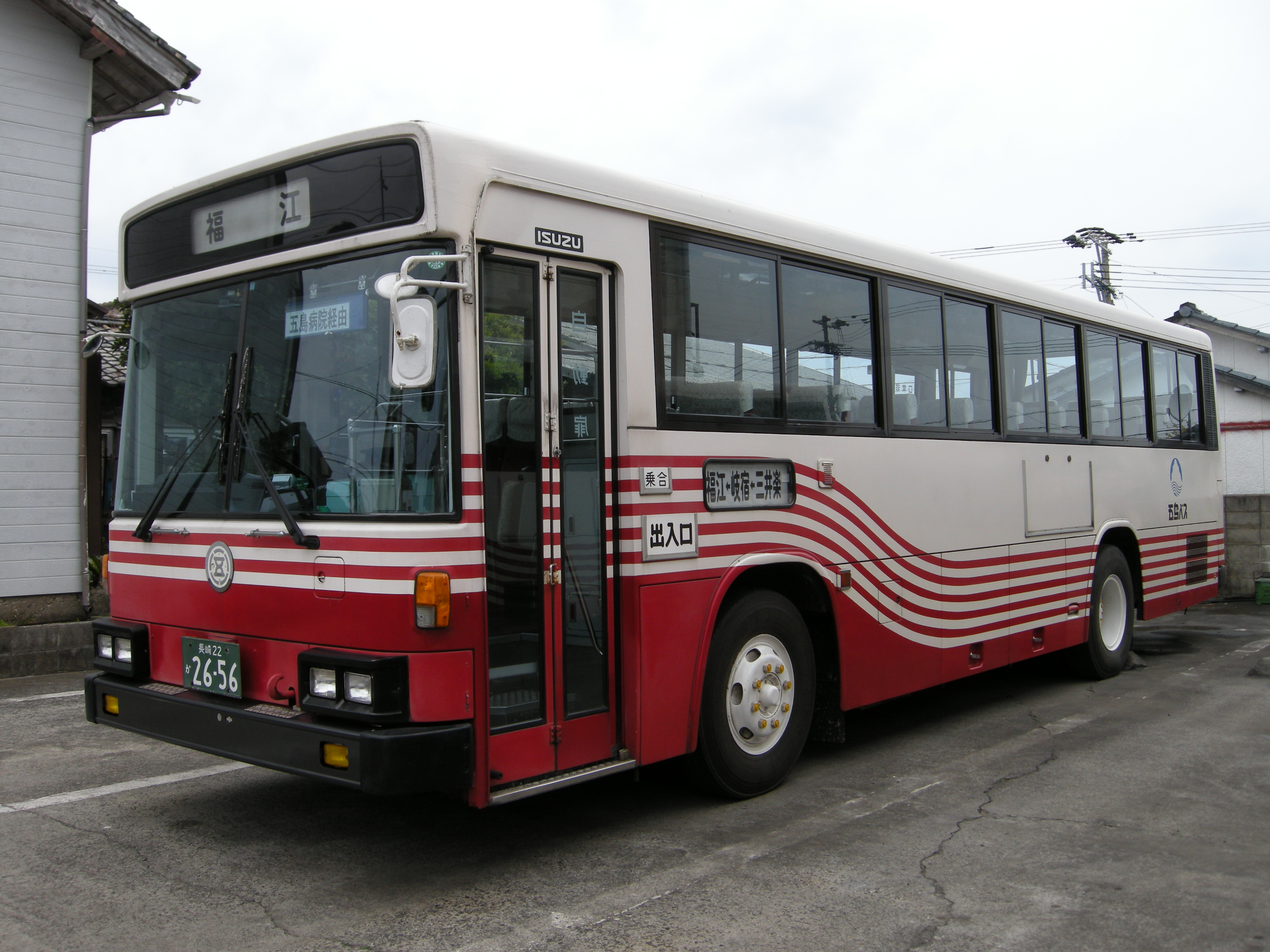 五島自動車（長崎県） 路線バスの車両